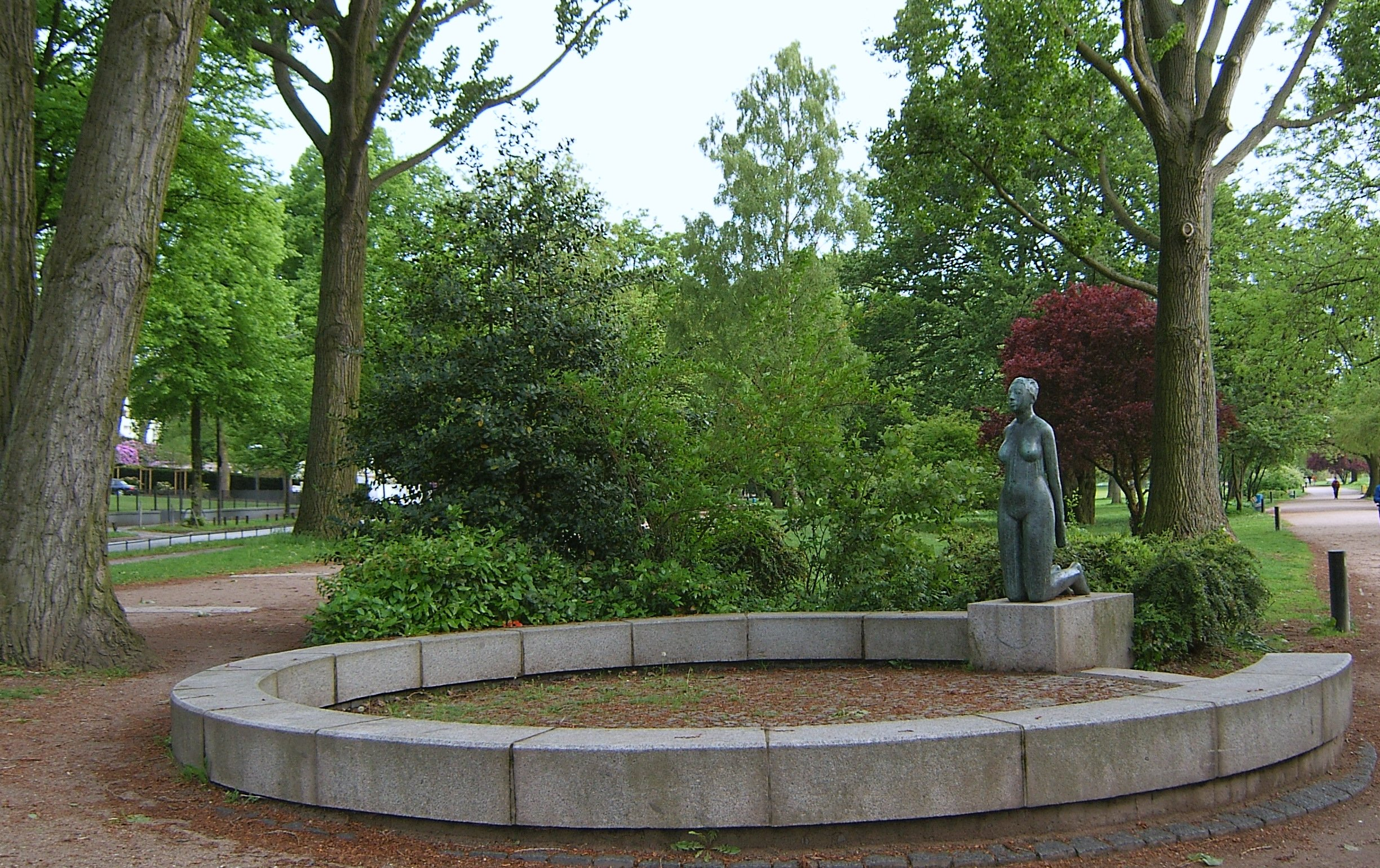 Bildbeschreibung:De Knieende (1962) Hamburg, Rotherbaum, Alstervorland, Fotograf: selbst Datum: 20.5.2006